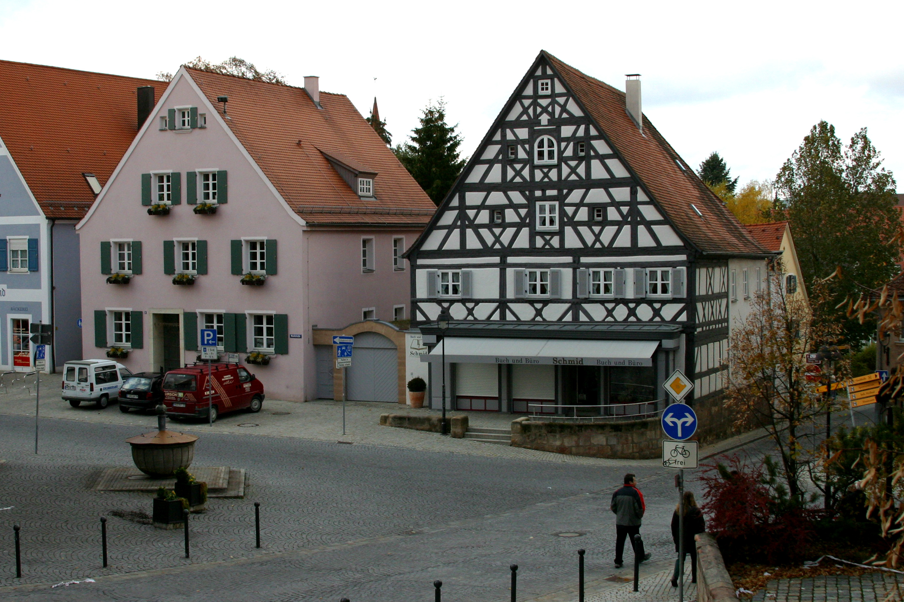 Picture from Hilpoltstein (Bayern), Schmidhaus